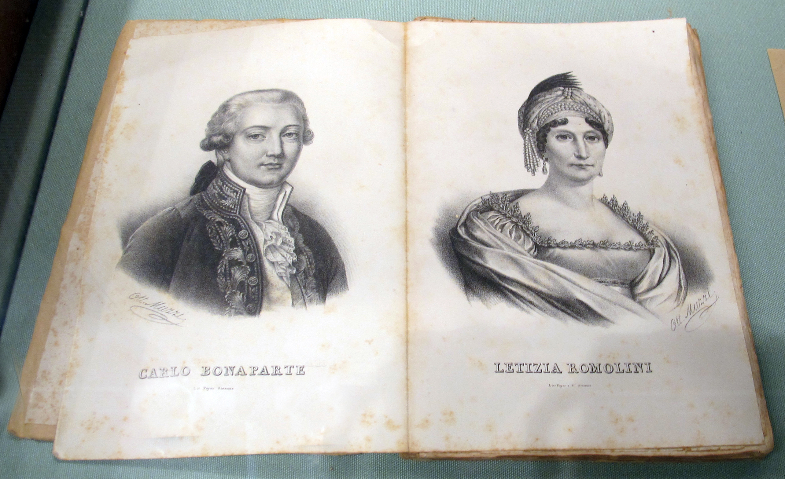 Accademia degli euteleti, int., documenti sulla famiglia buonaparte, carlo buonaparte e letizia ramolino